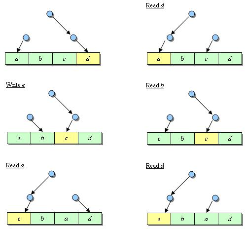 Sequence PLRUt